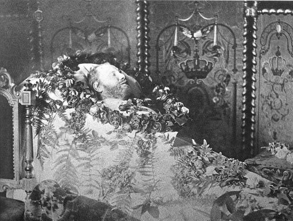 Foto genomen van Prins Alexander op zijn doodsbed